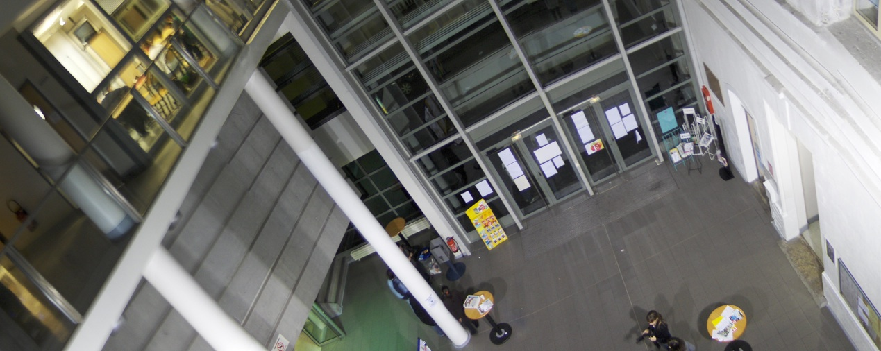 Institut d'études politiques de Lyon, Atrium